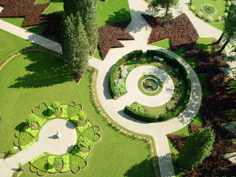 Schloss Eggenberg, Planetengarten, Detail aus der Luft